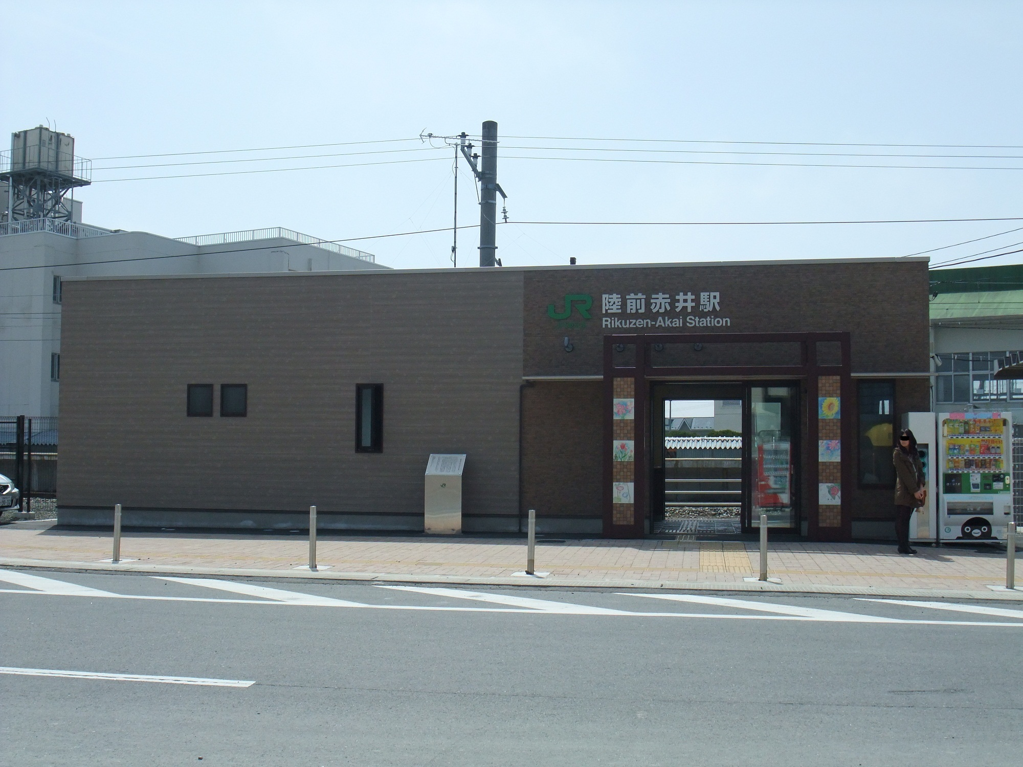 陸前赤井駅(新駅舎)